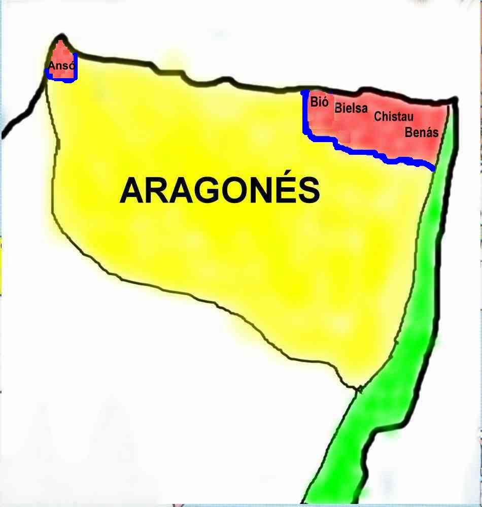 Aragonés: zona d'emplego d'os incoativos en aragonés